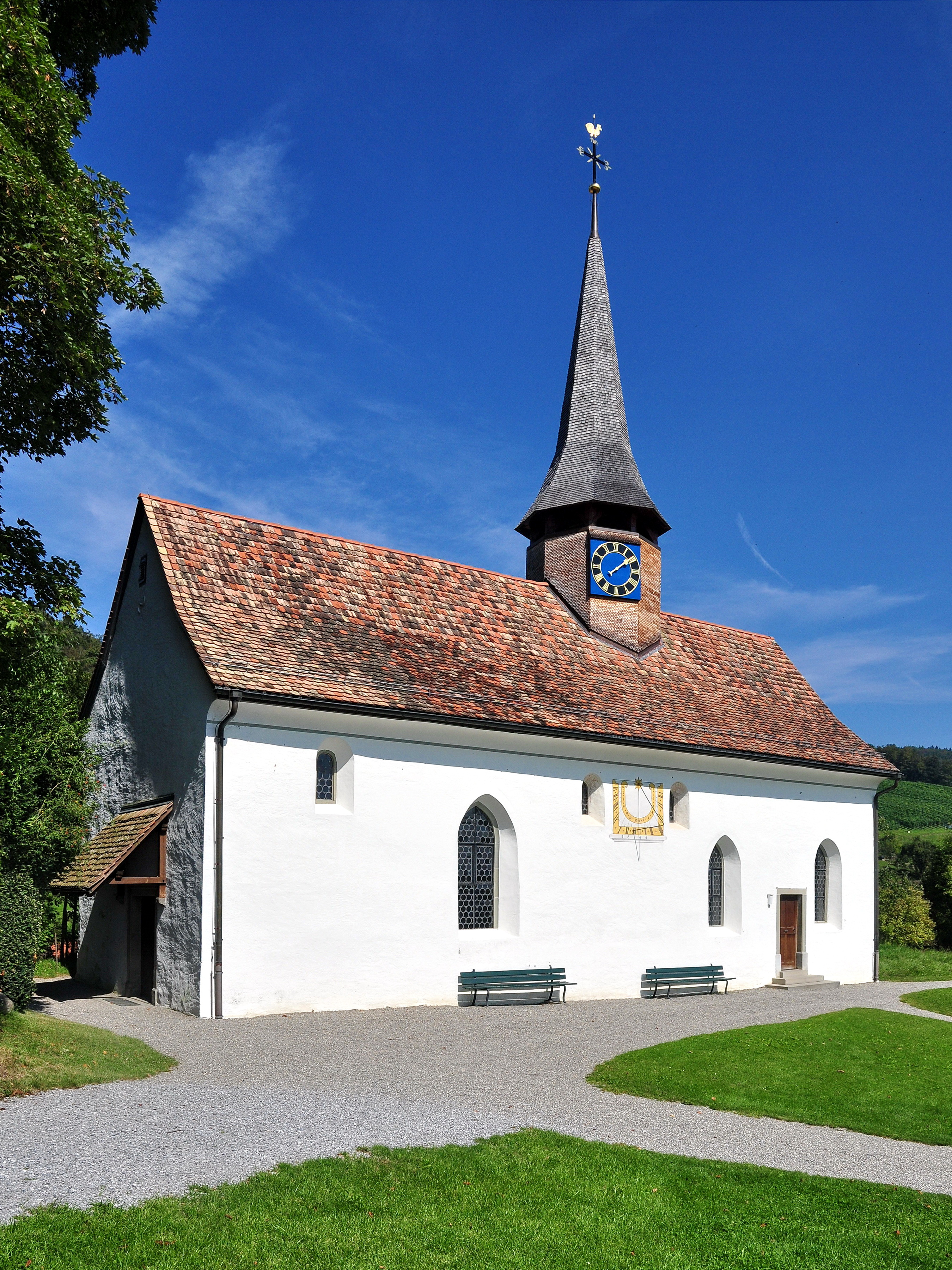 Reformierte Galluskapelle, Chilenbückli in Oberstammheim (Switzerland)